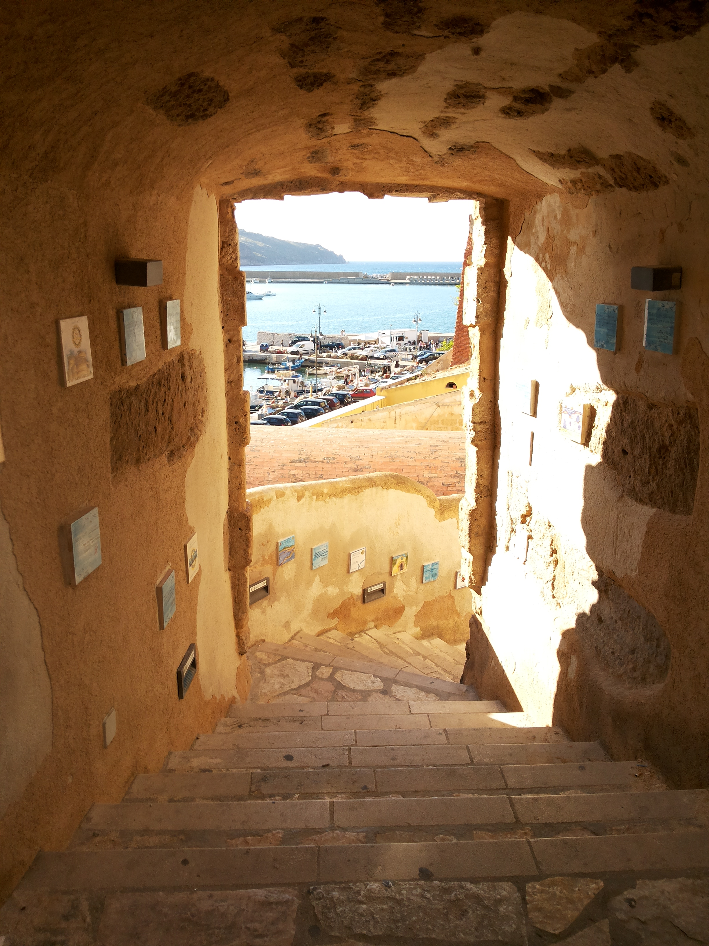 Scalinata verso la marina a Castellammare del Golfo